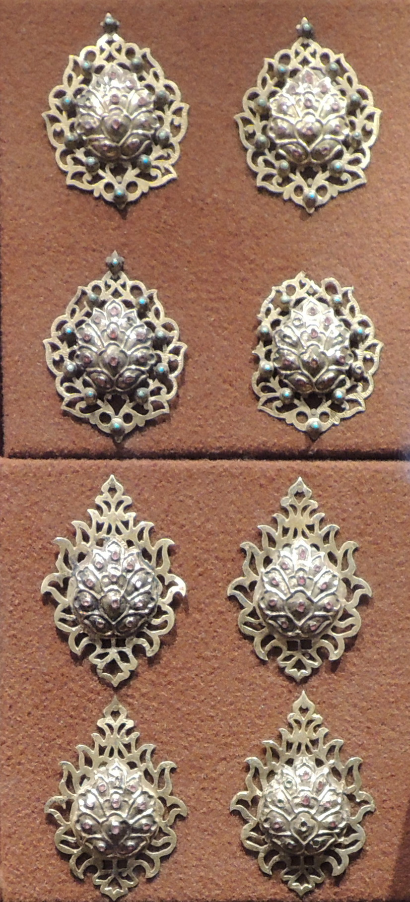 Запоны